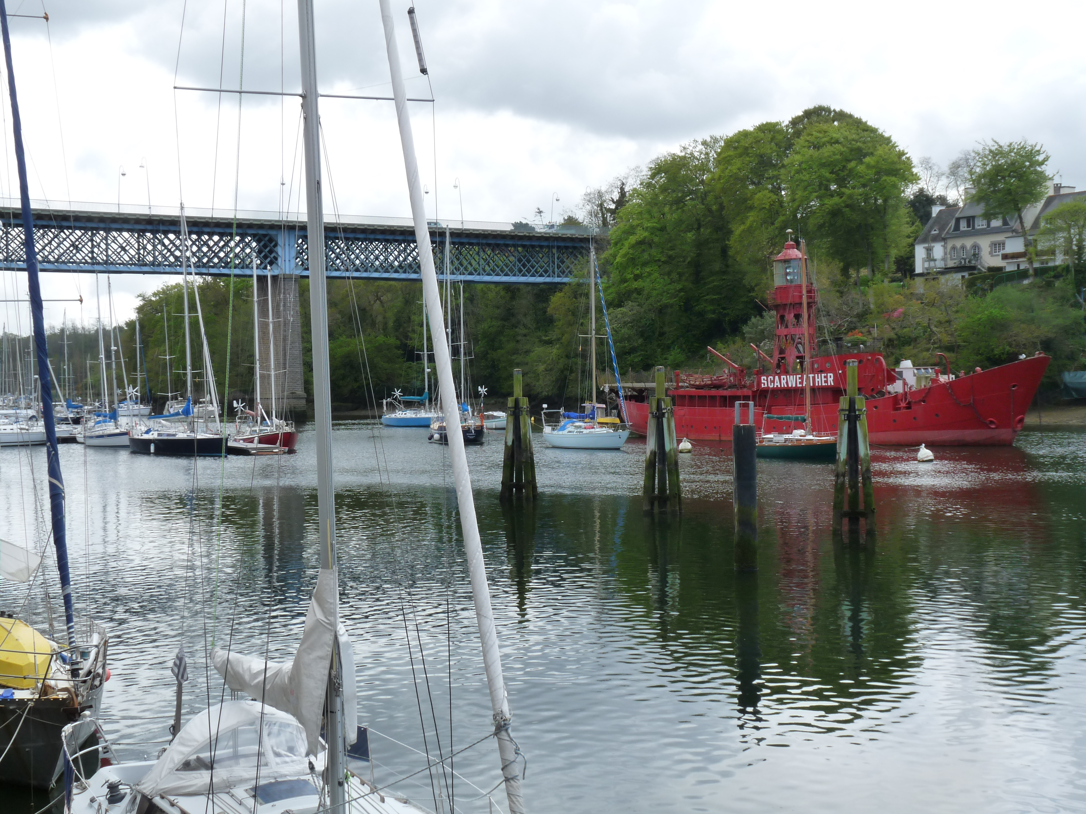 Le Scarweather dans le port-musée de Douarnenez (Finistère)